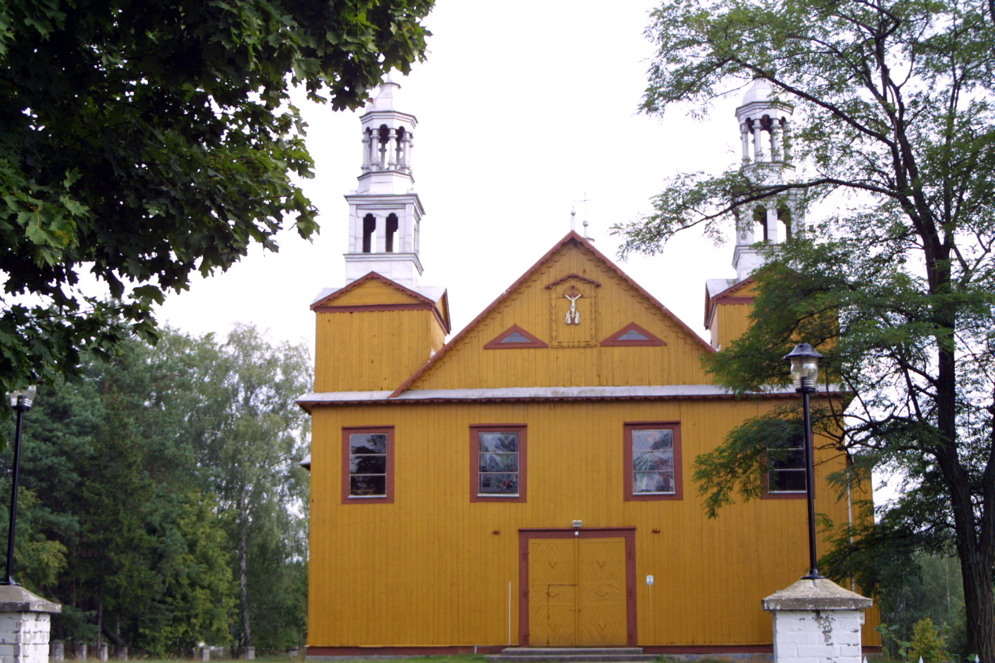 Dąbrówka pow. ostrołęcki. Kościół pw. św. Anny (1891-1892).